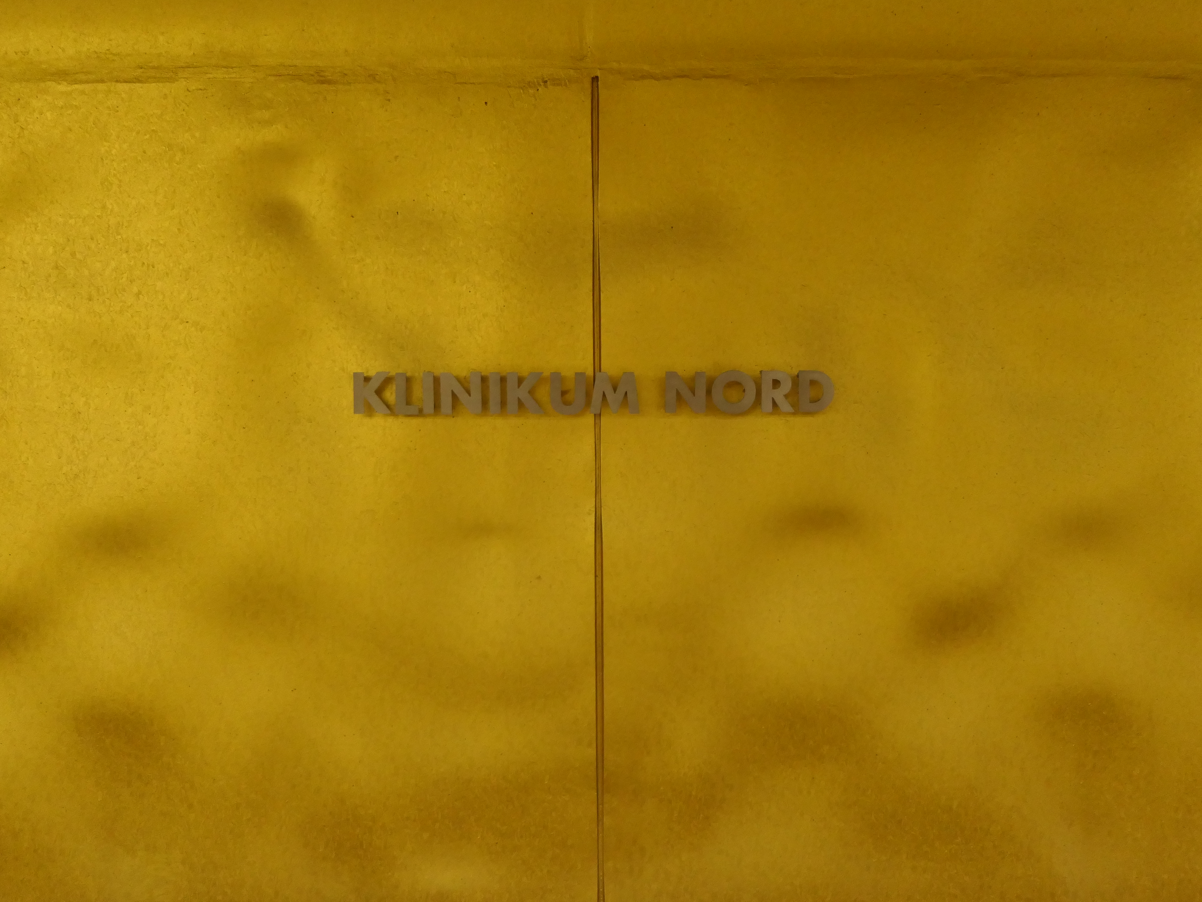 Stationsname an den Bahnsteigwänden am U-Bahnhof Klinikum Nord in Nürnberg.